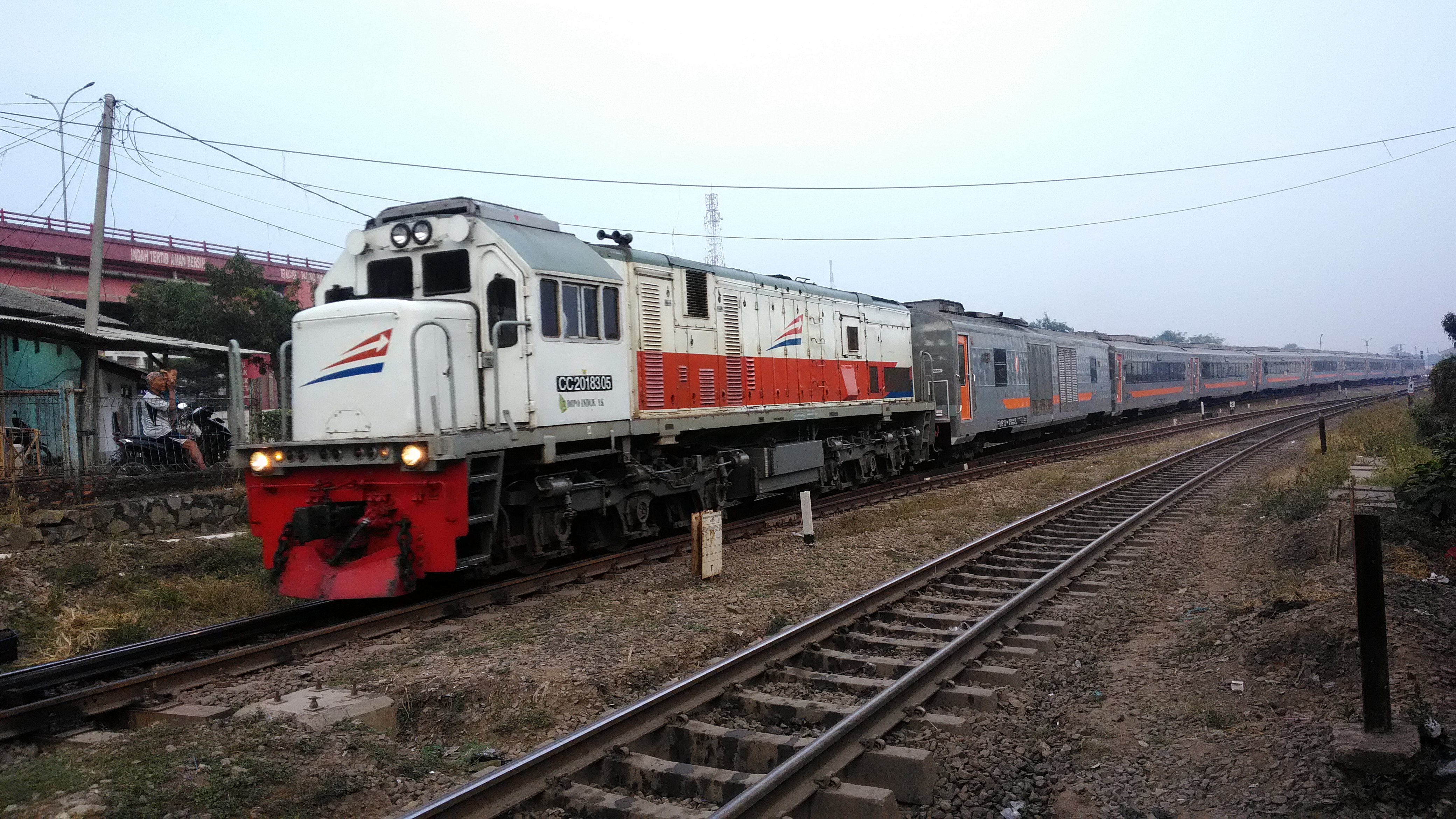 KA Fajar Utama Yogyakarta Stainless Steel Melintas JPL 1 Cikampek Sunda: KA Fajar Utama Yogyakarta Stainless Steel Ngaliwatan JPL 1 Cikampék